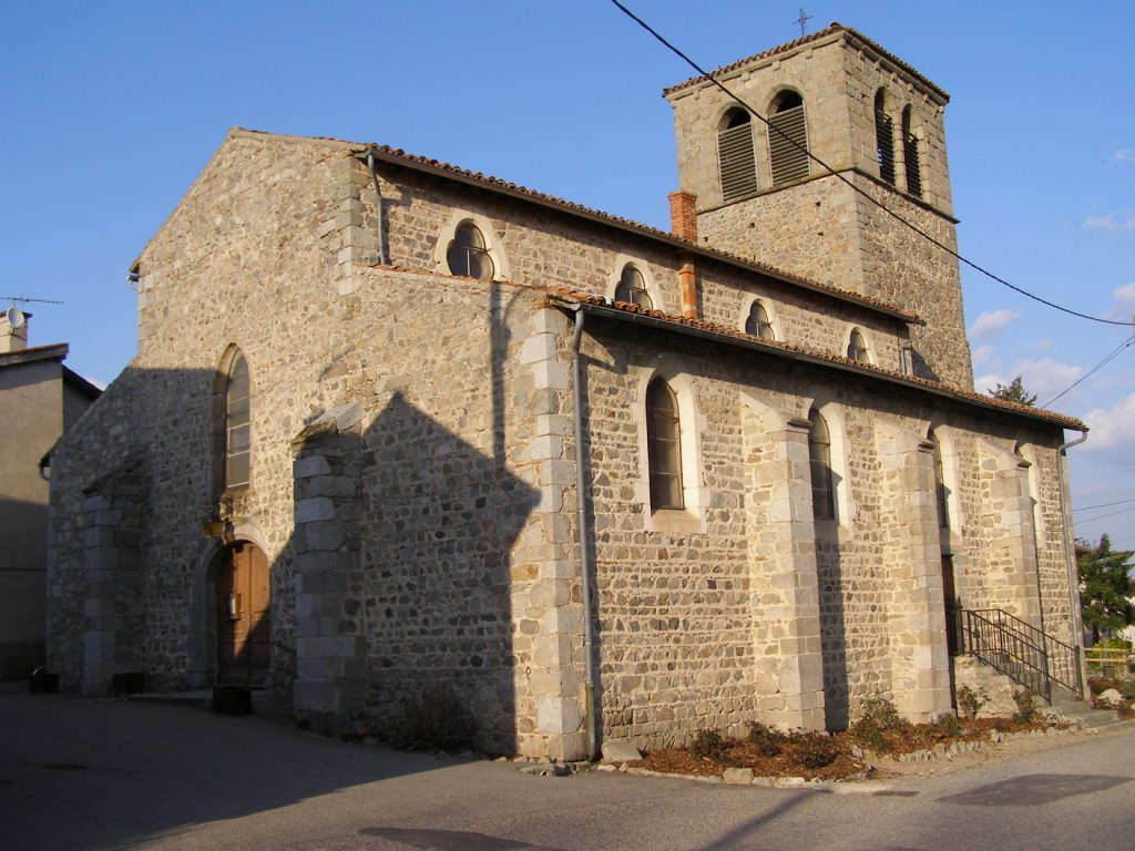 Entrée principale